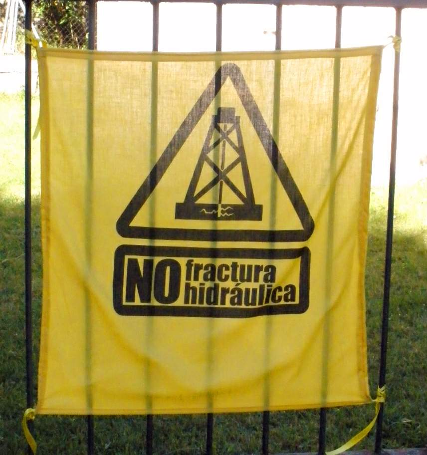 Hoyos del Tozo (Burgos, Castilla y León, España). Cartel de rechazo vecinal a la posible práctica de fracking en el Parque Natural de las Hoces de Alto Ebro y Rudrón, en las comarcas burgalesas de Sedano y las Loras, y las Merindades